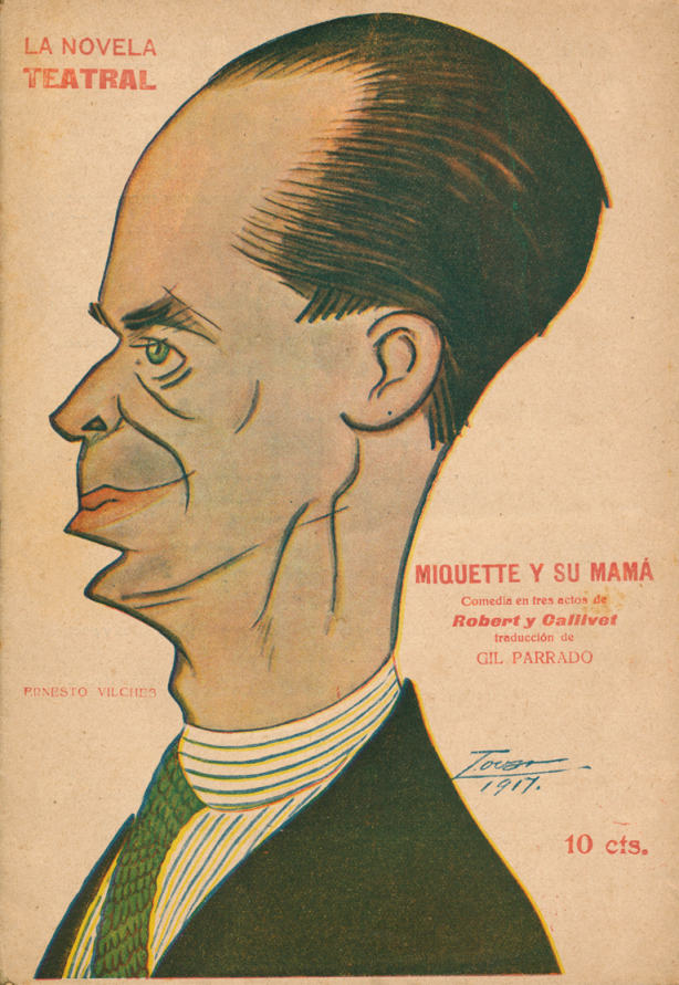 Ricardo Puga.